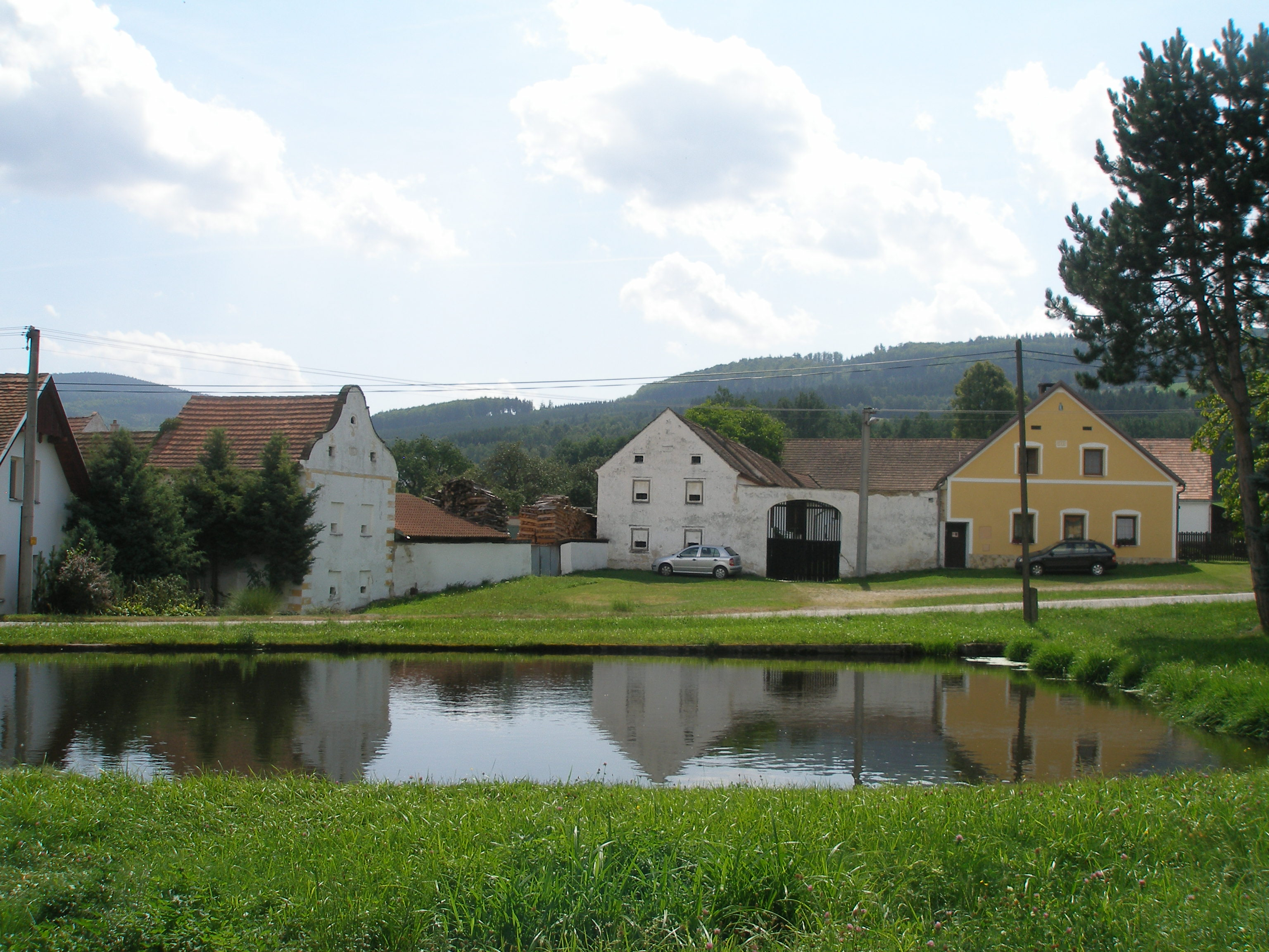 Rojšín - historická zástavba vsi